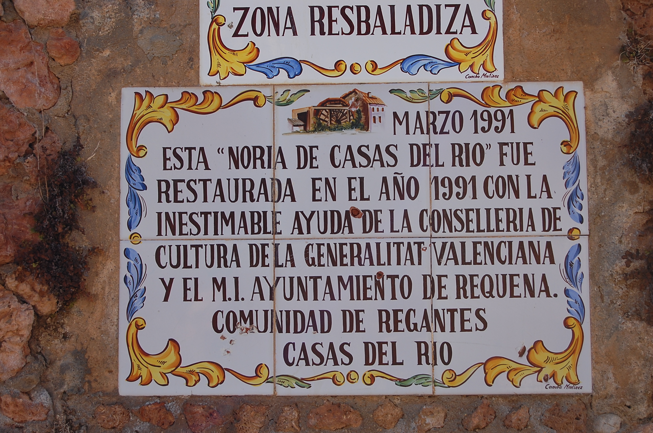 Placa restauracion 1991